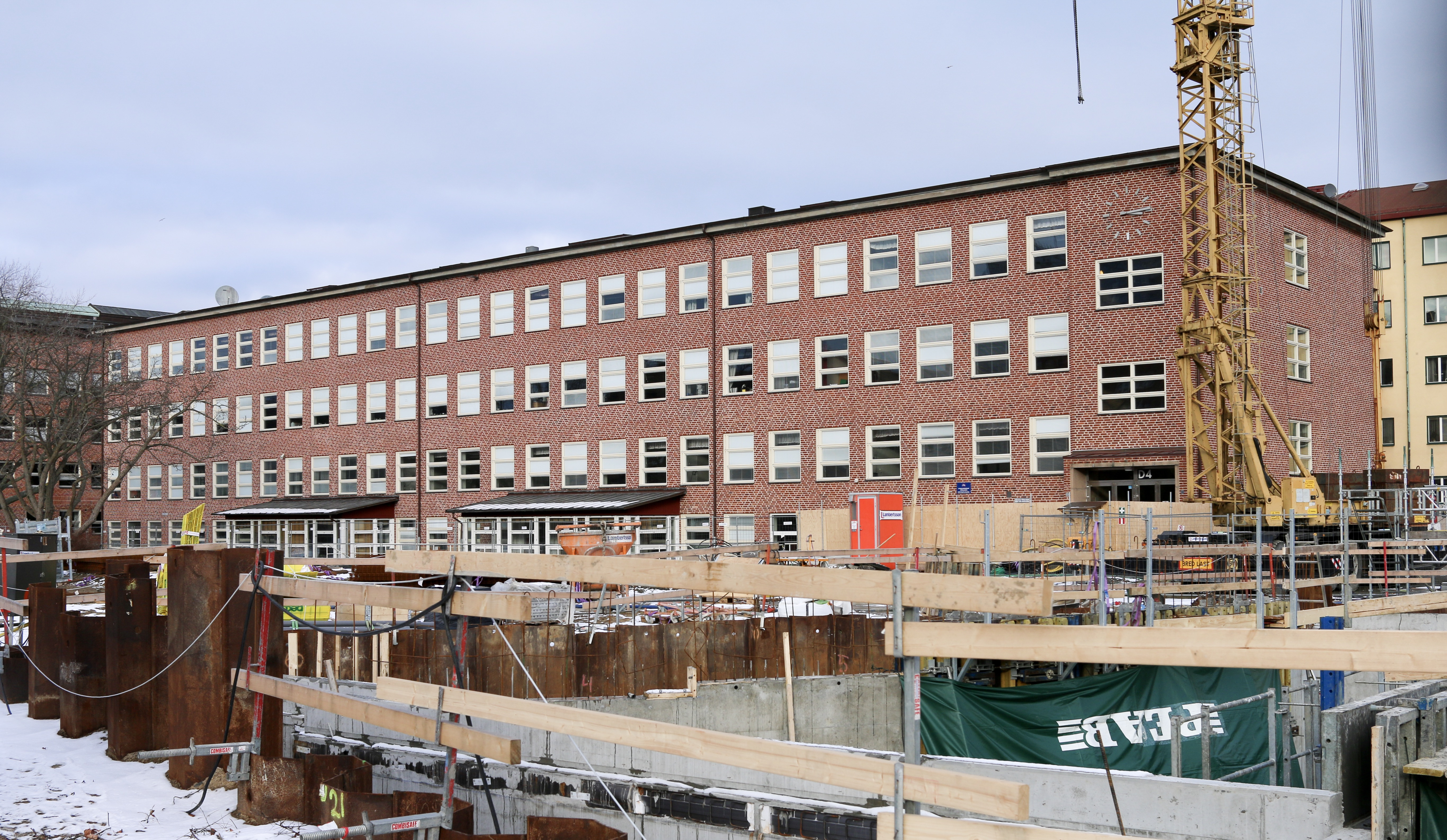 Borgarskolan, Malmö, 2017